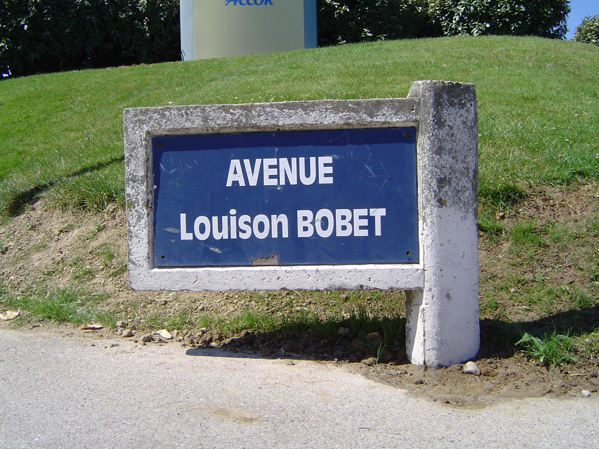 Photos de plaques de rues prises dans la commune du Touquet-Paris-Plage